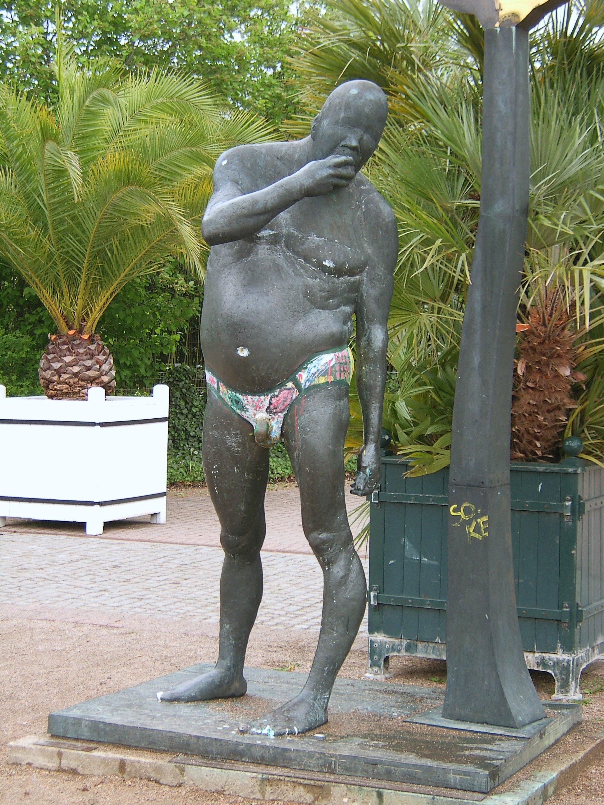 Skulptur am Eingang des Botanischen Gartens in Osdorf.